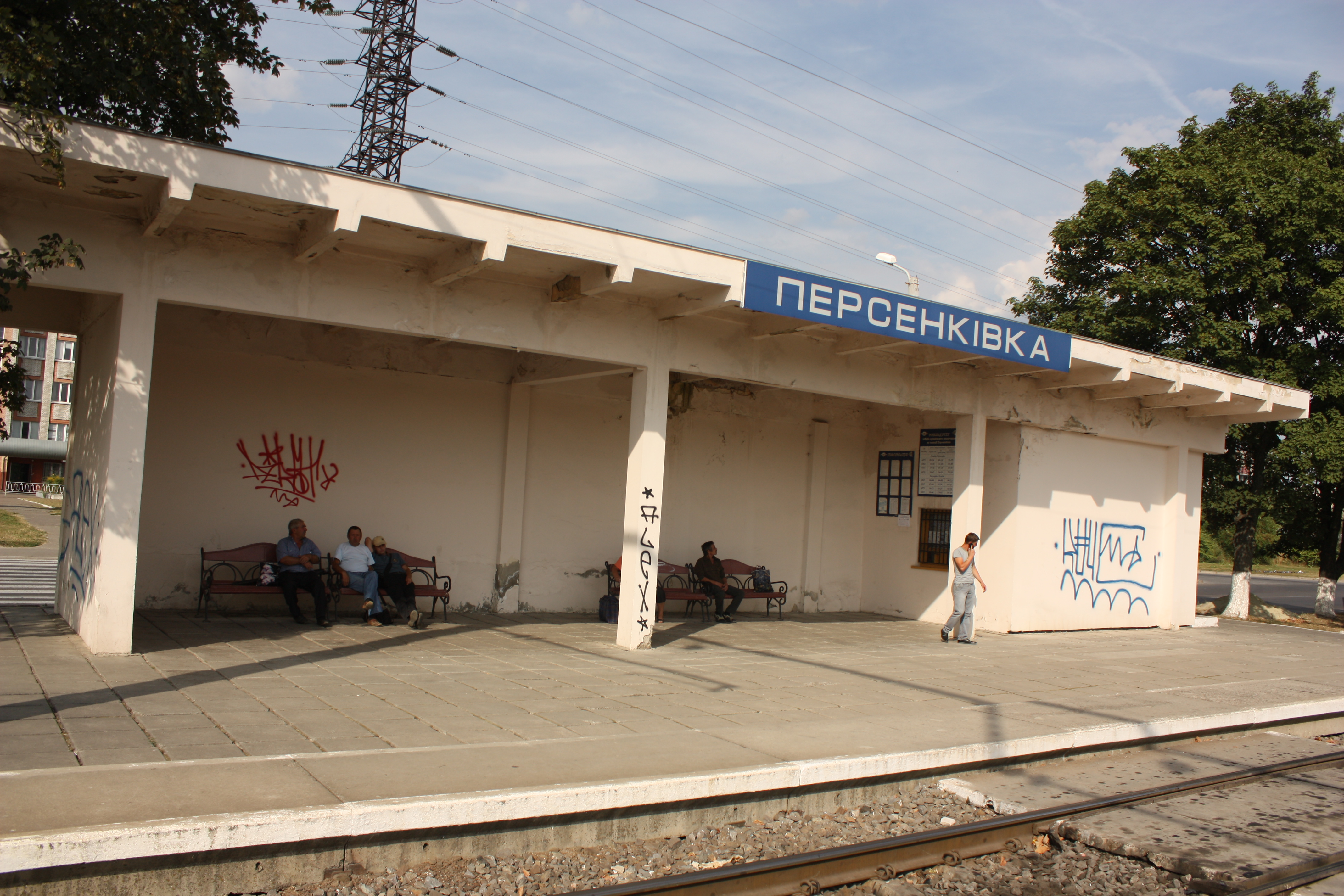 Станція "Персенківка" у Львові в серпні 2015 р.